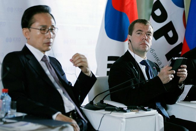 На заключительном пленарном заседании форума «Диалог Россия – Республика Корея». С Президентом Республики Корея Ли Мён Баком.